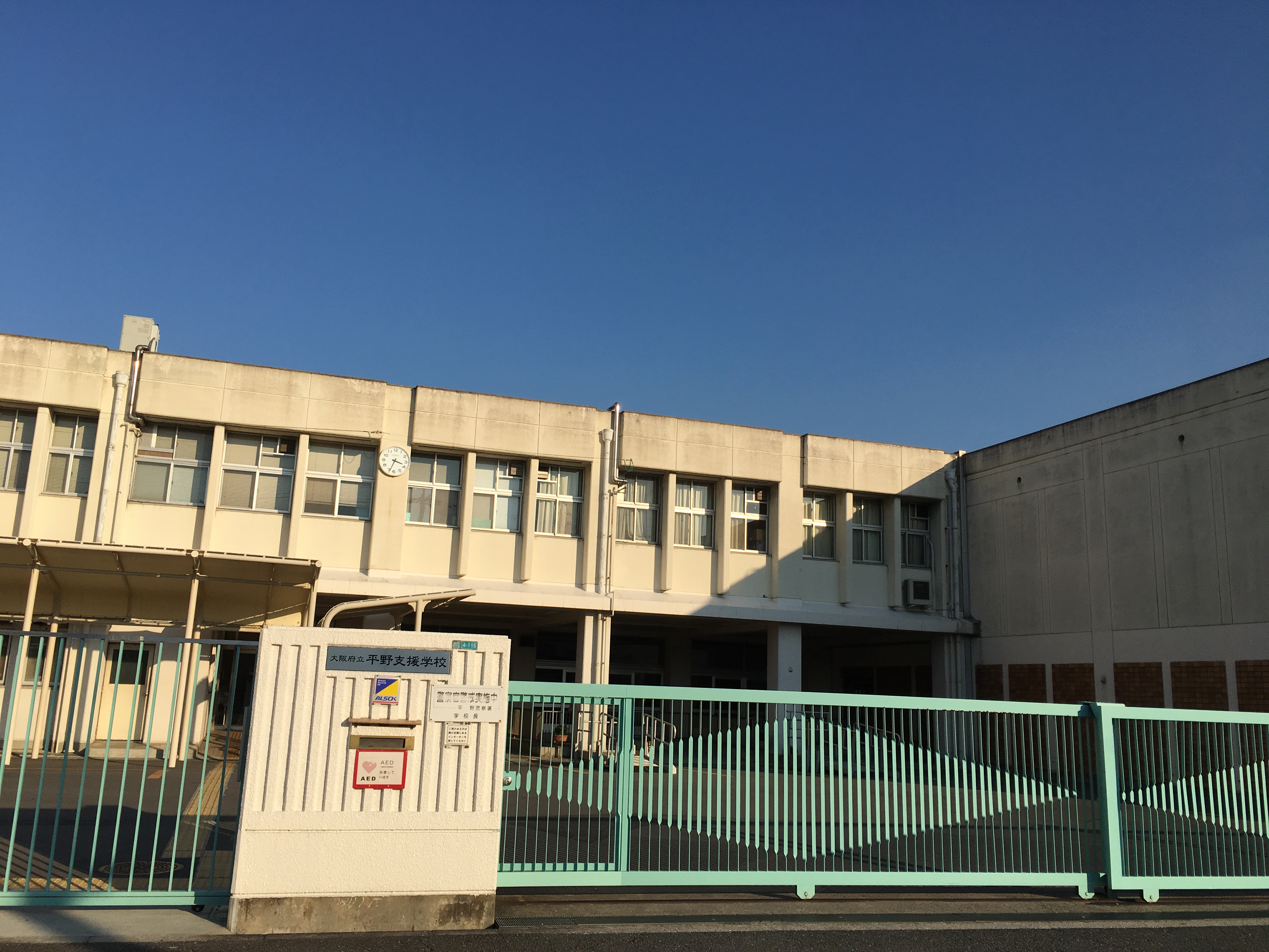 大阪府立平野支援学校